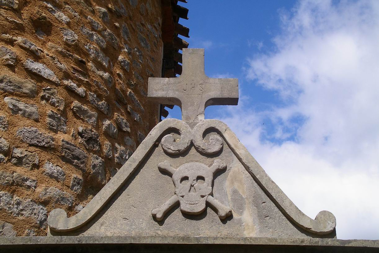 Totenkopf über dem Friedhofseingang von Rennes-le-Château